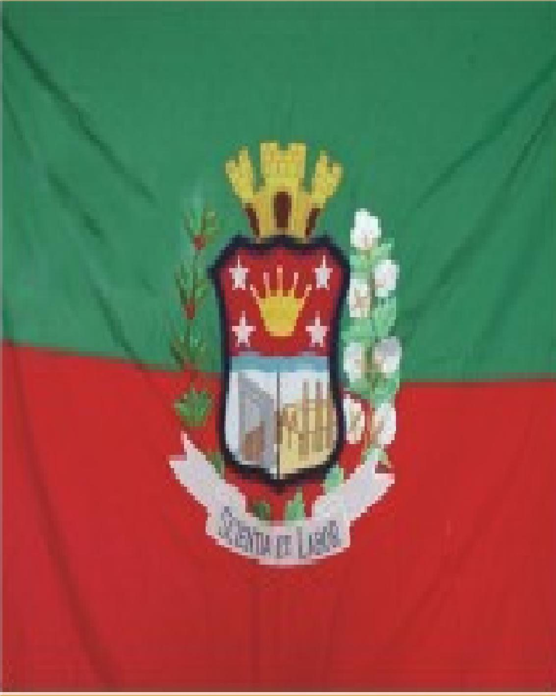 Essa foto foi tirada em paraíso do norte no dia 28/10/2008 em frente à prefeitura municipal por Felipe Vizzoto